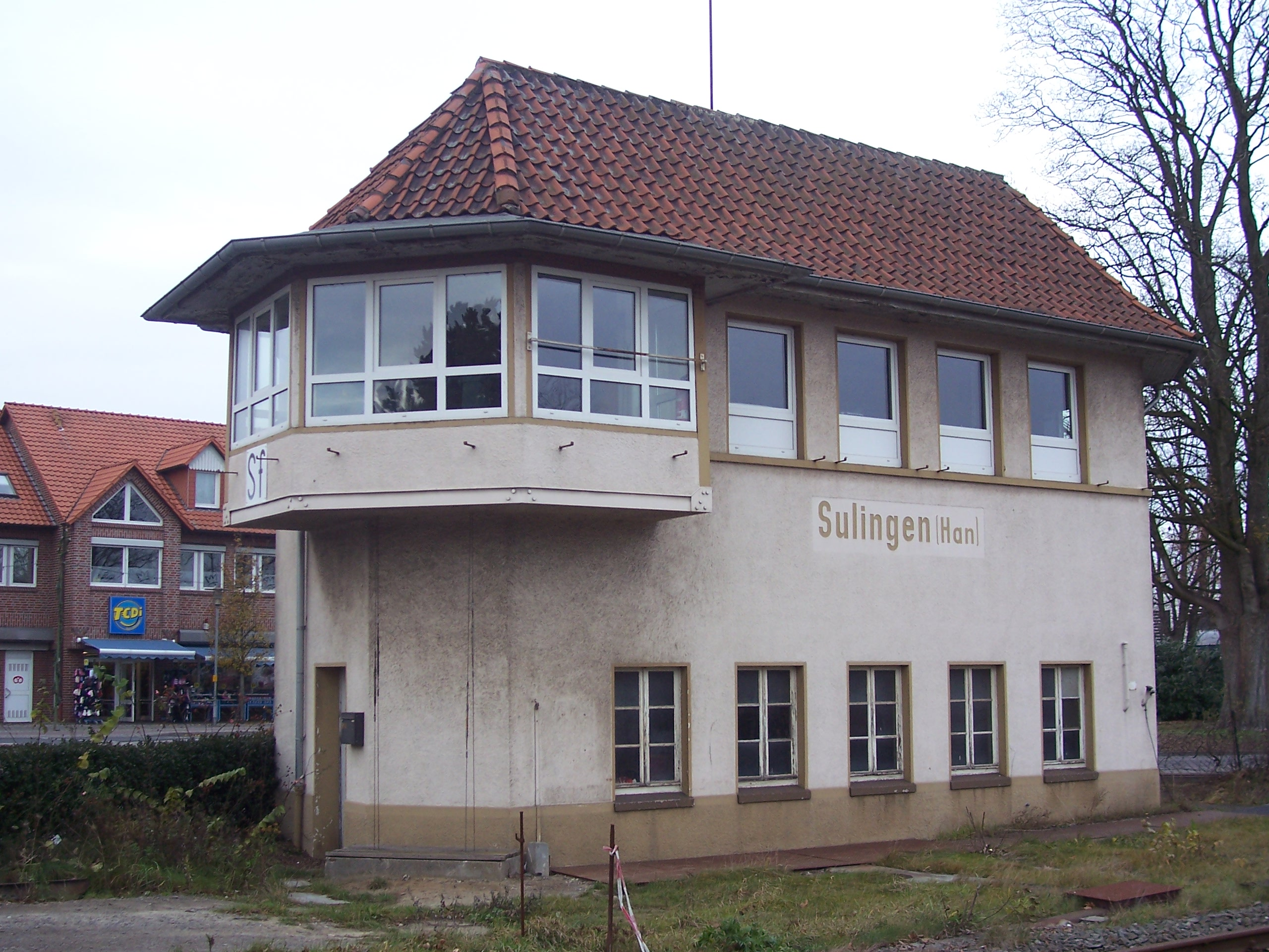 Fahrdienstleiter-Stellwerk Sf im Bahnhof Sulingen